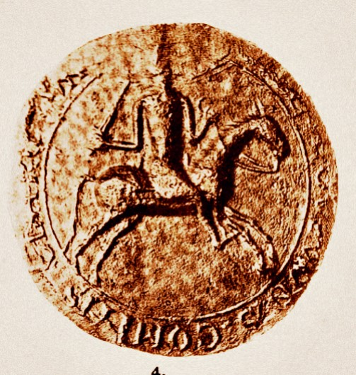 Guy II d'Auvergne, sceau du XIIème siècle.